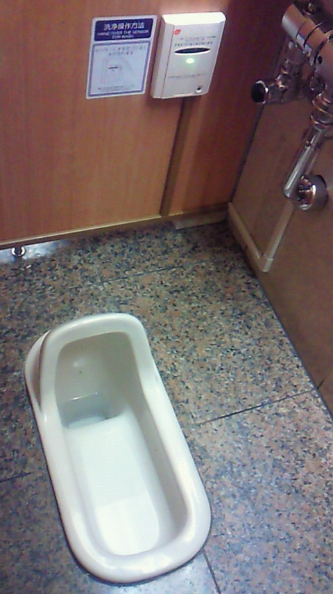 C750和式